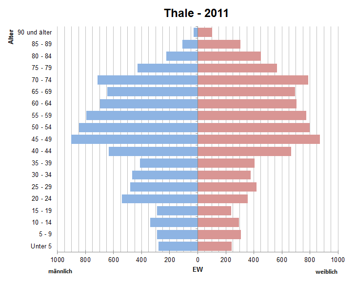 Bevölkerungspyramide der Stadt Thale nach Zensus 2011.